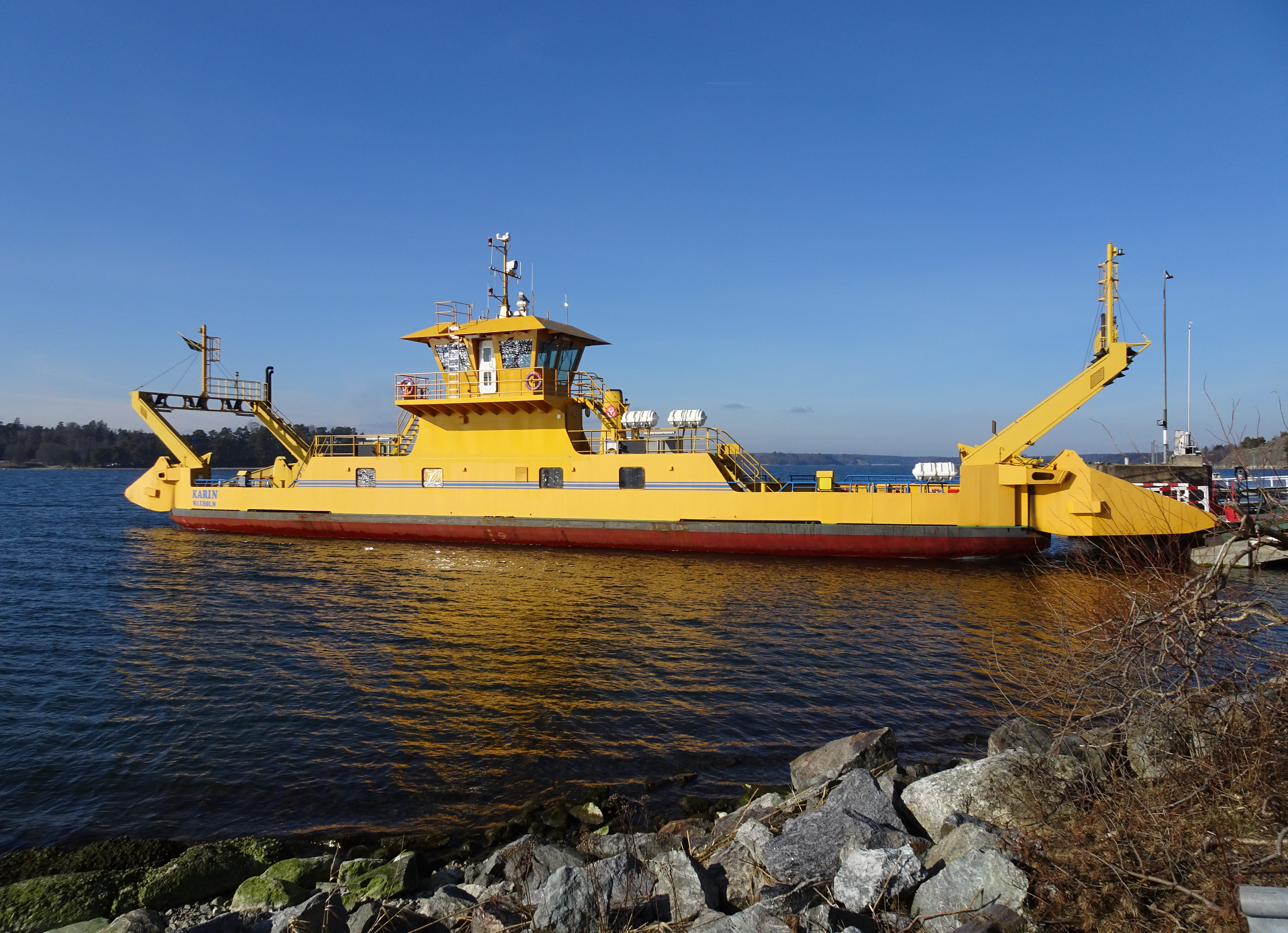 M/S Karin i Hörningsnäs